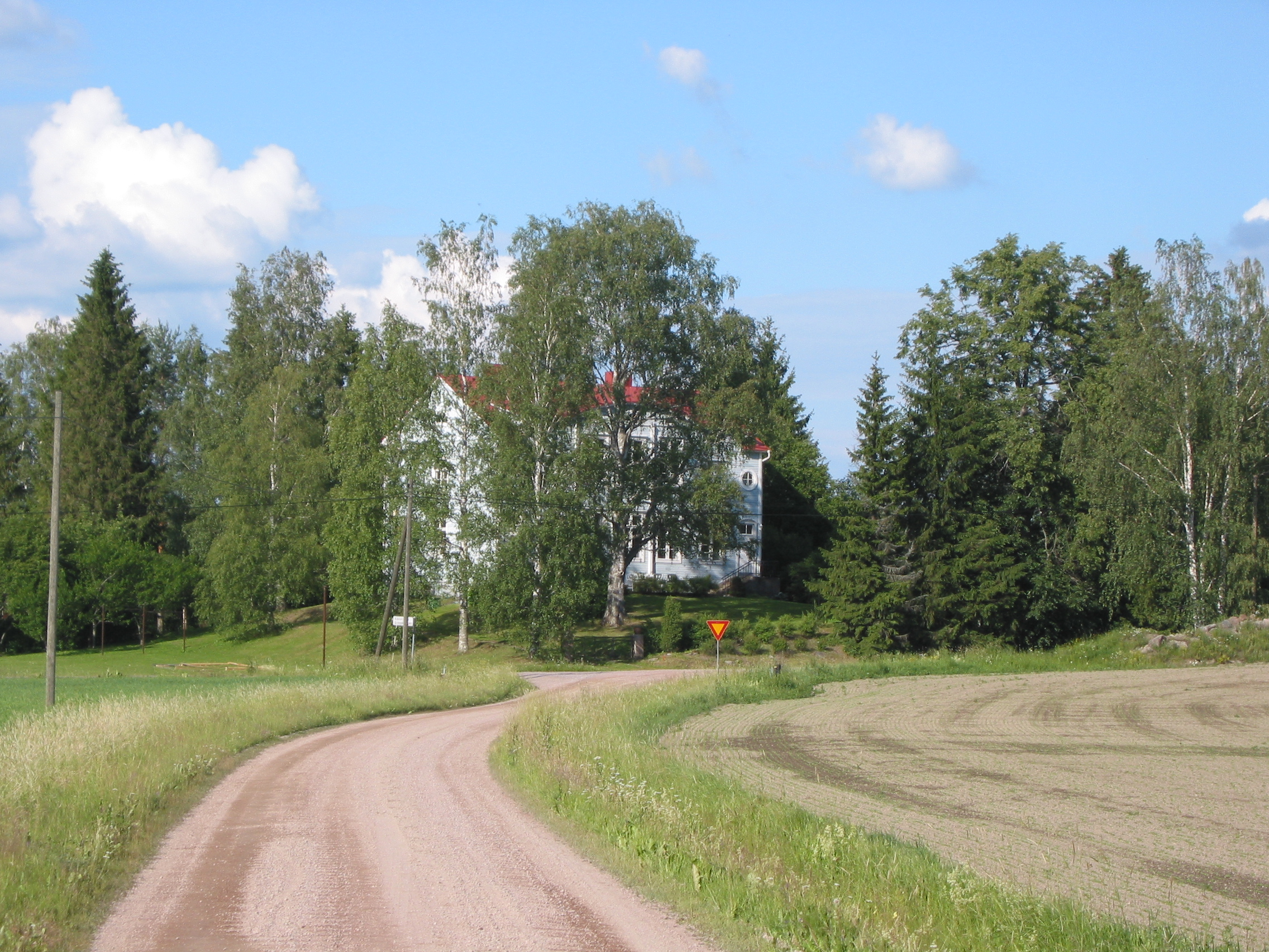 Kreivilän entinen koulu, Myrskylä